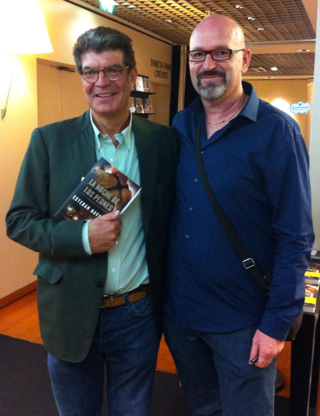 Los escritores Juan Bolea y Esteban Navarro en Zaragoza.